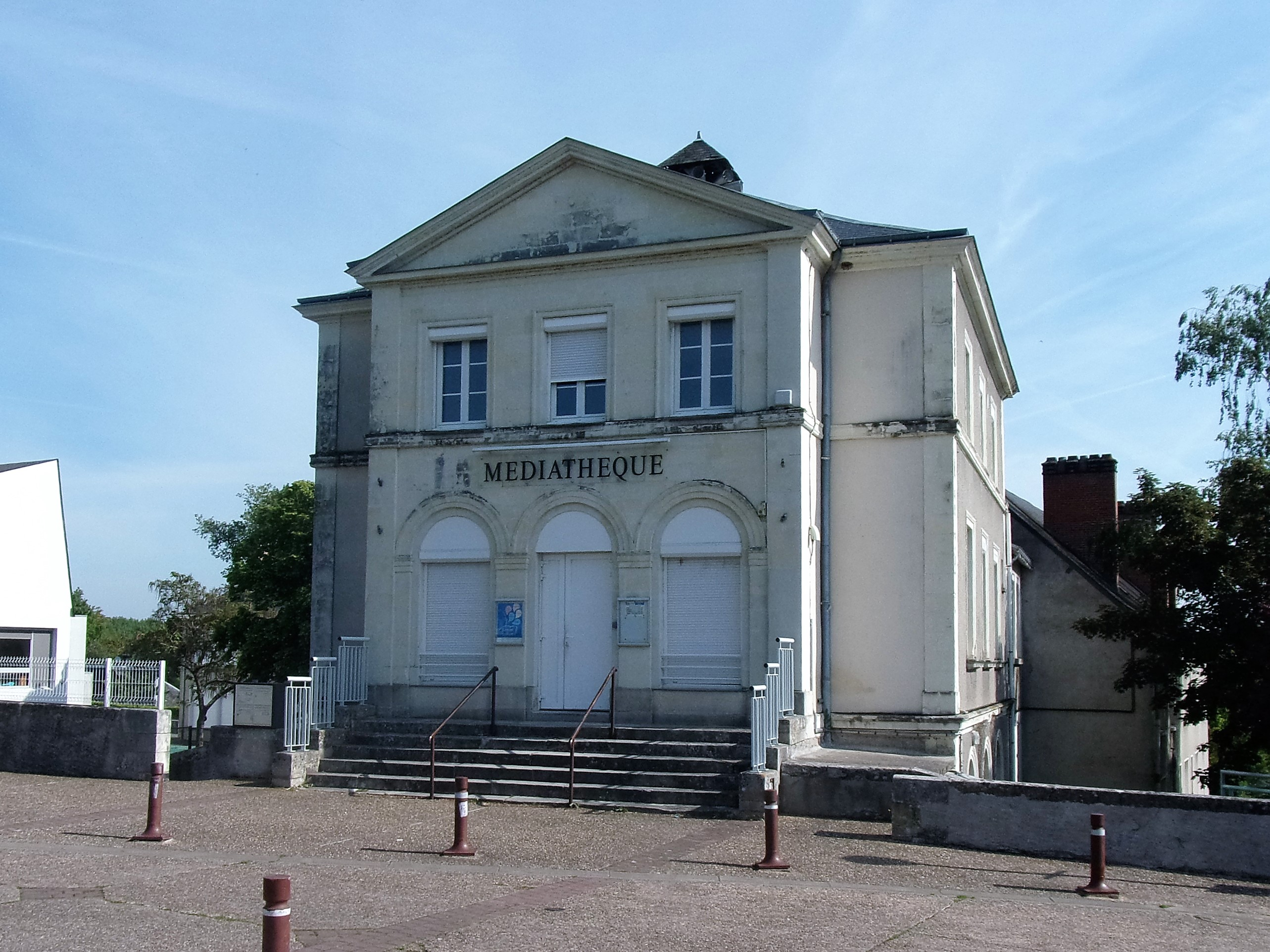 Médiathèque installée dans l'ancienne mairie (Monts, 37)